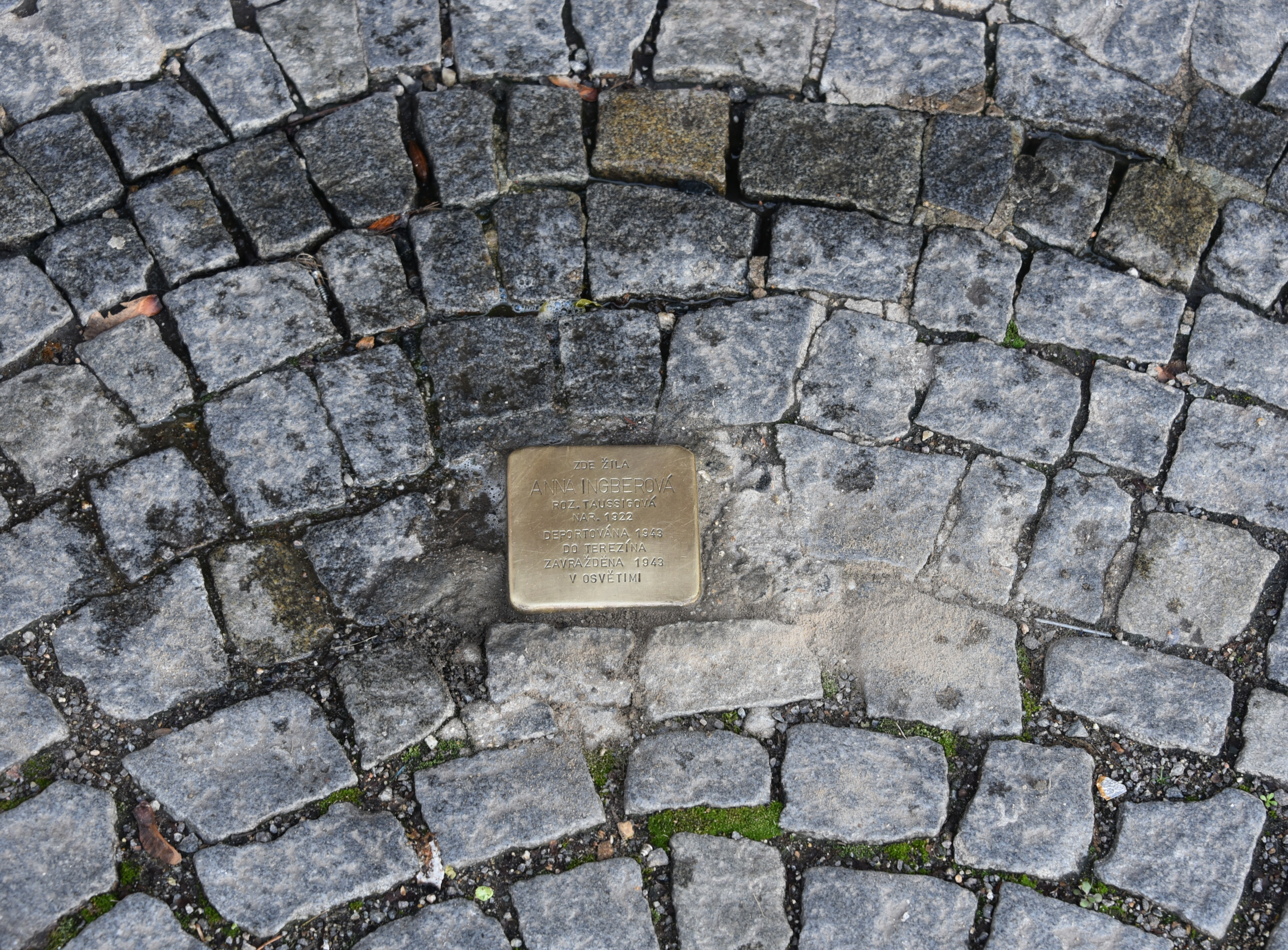 Stolperstein in Trebice für Anna Ingberová